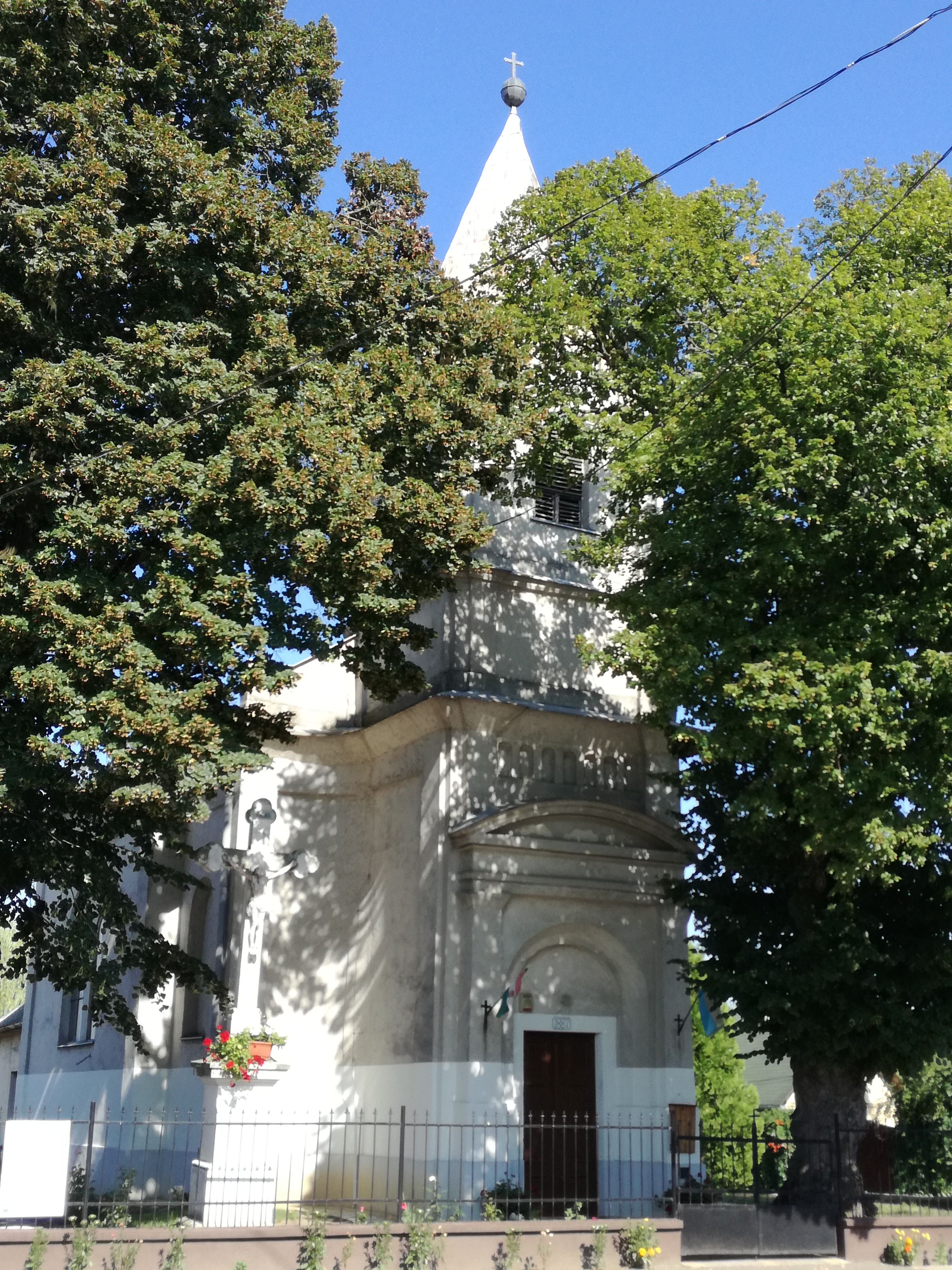 Katholische Kirche in Jéke